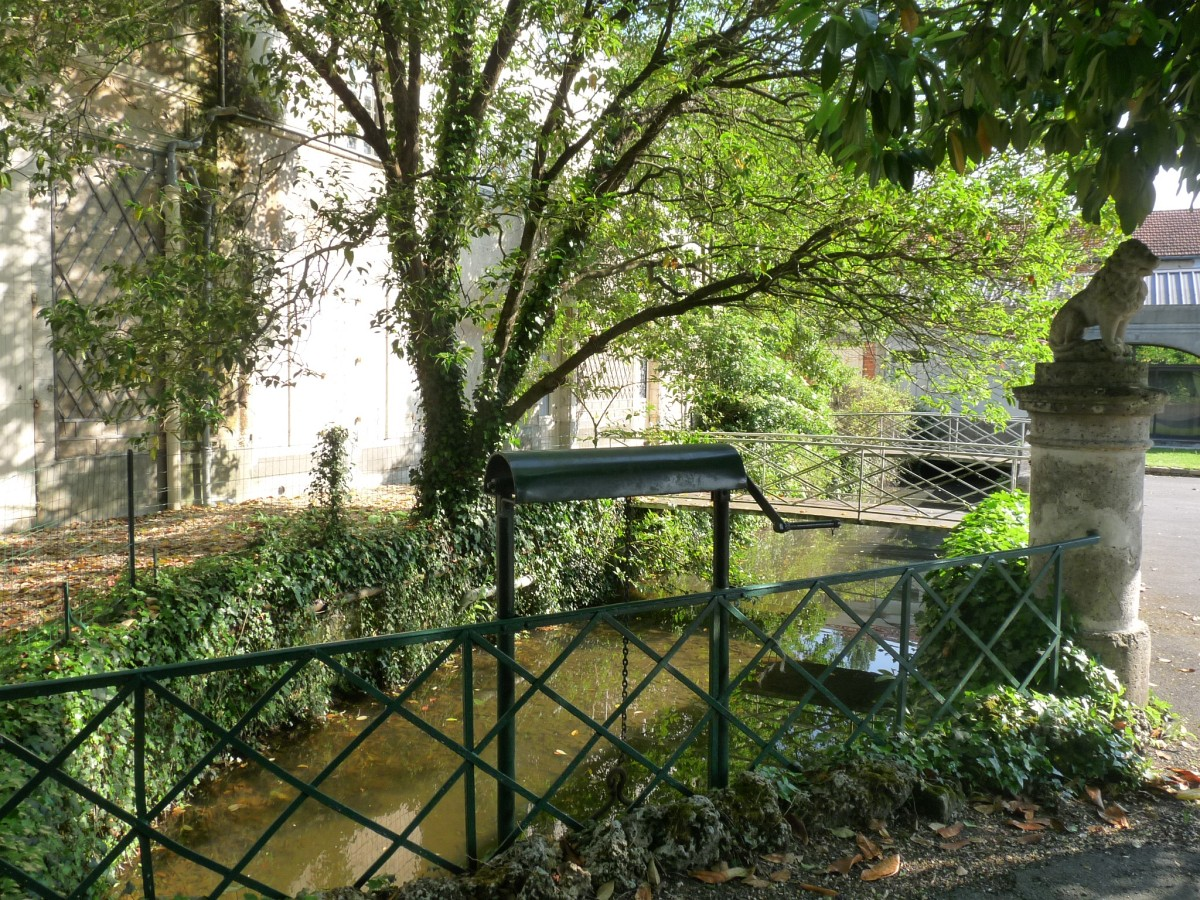 Papeterie de l'Escalier, La Couronne (Charente, France)